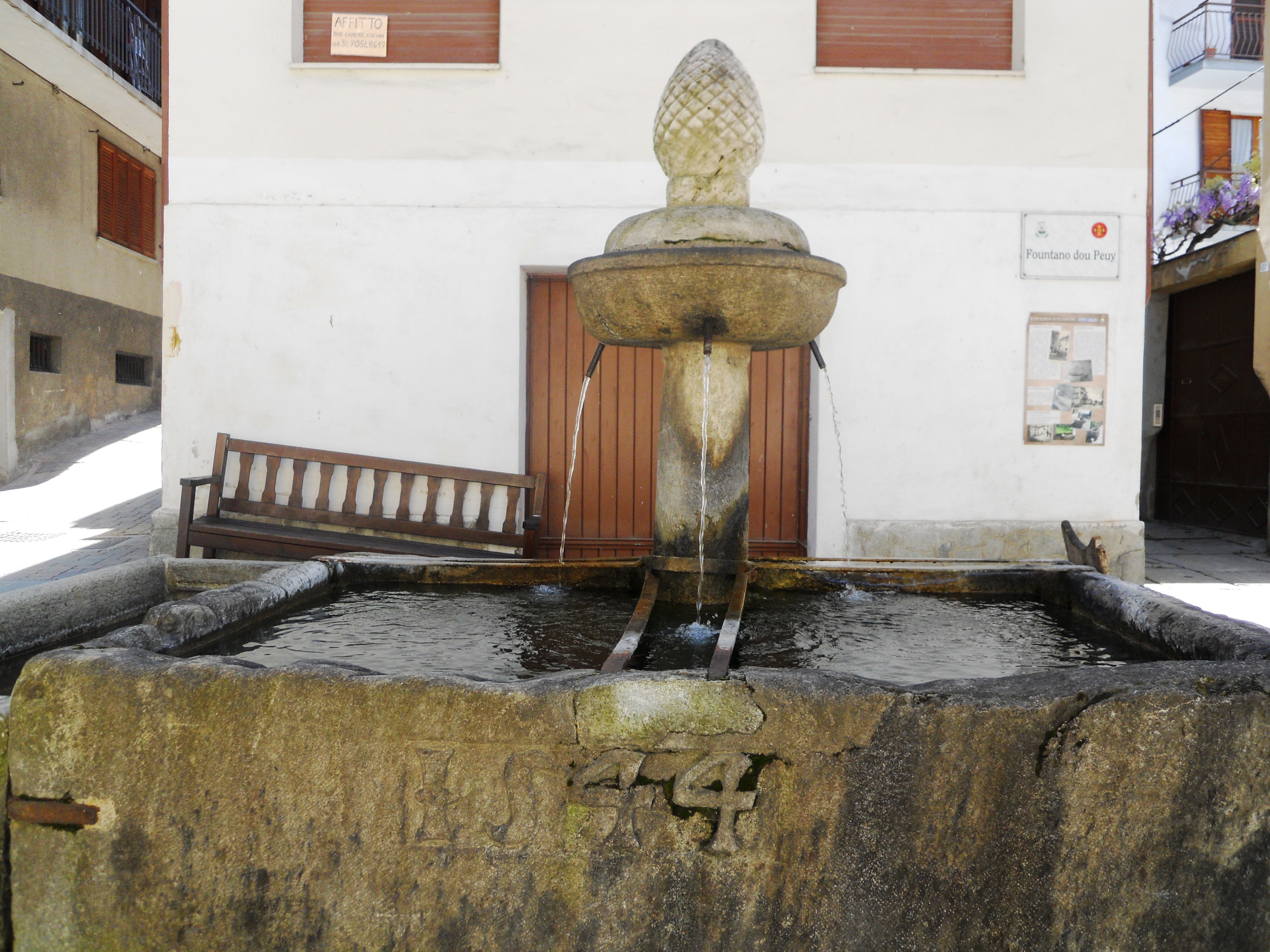 Fontana del Peuy, datata 1584